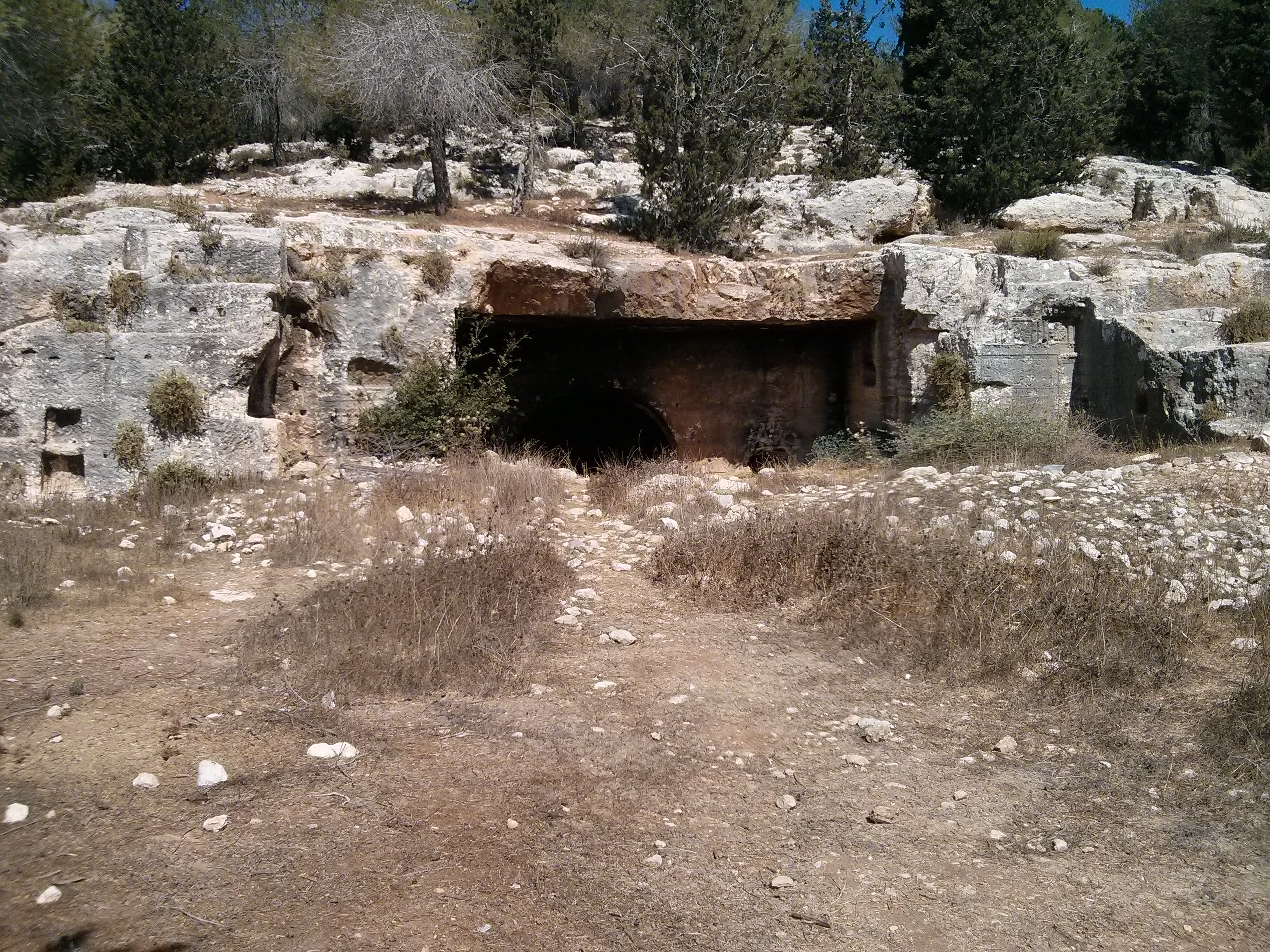 מערכת קבורה מפוארת מתקופת בית שני.